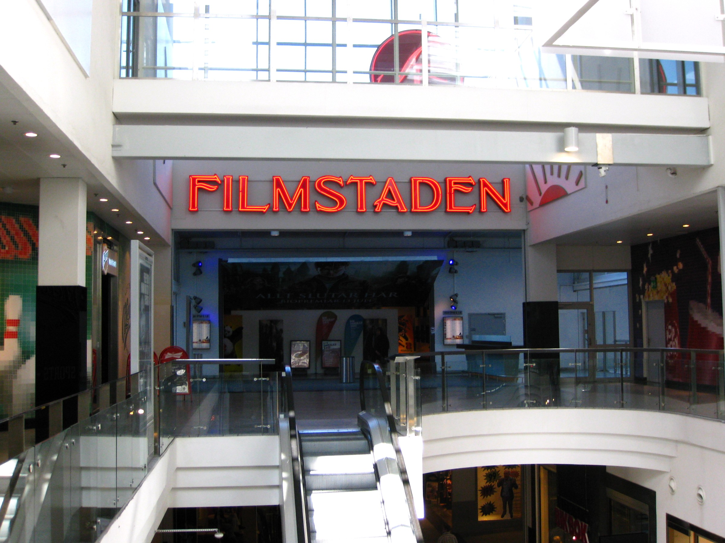 Filmstaden Kista i Kista, norra Stockholm.